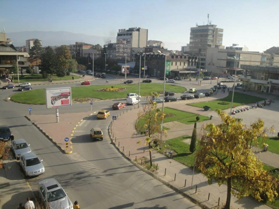 Hier sieht man das Stadtzentrum von Tetovo. In unmittelbarer Nähe sitzen einige Verwaltungseinrichtungen der Kommune.